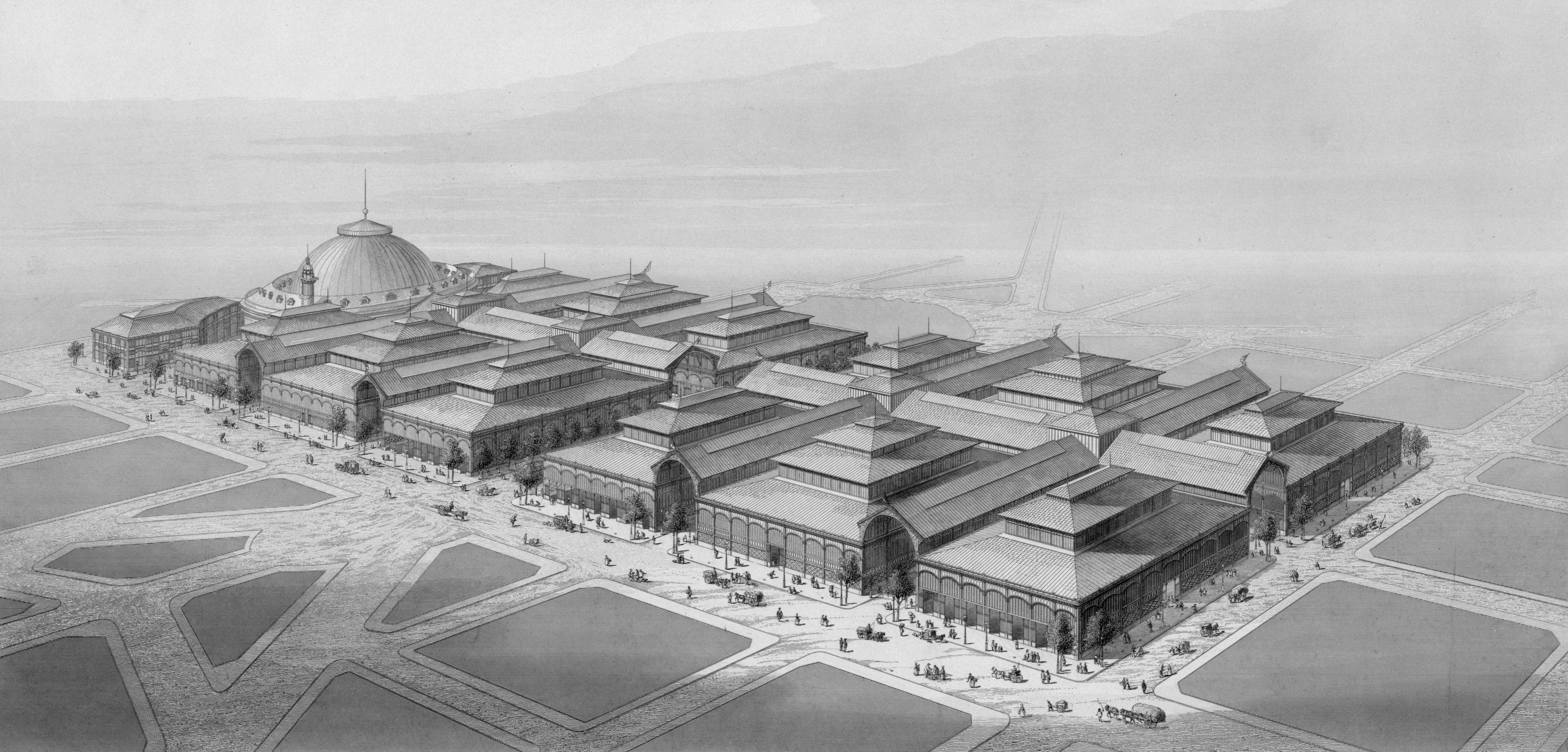 "Halles centrales de Paris. Vue perspective à vol d'oiseau."